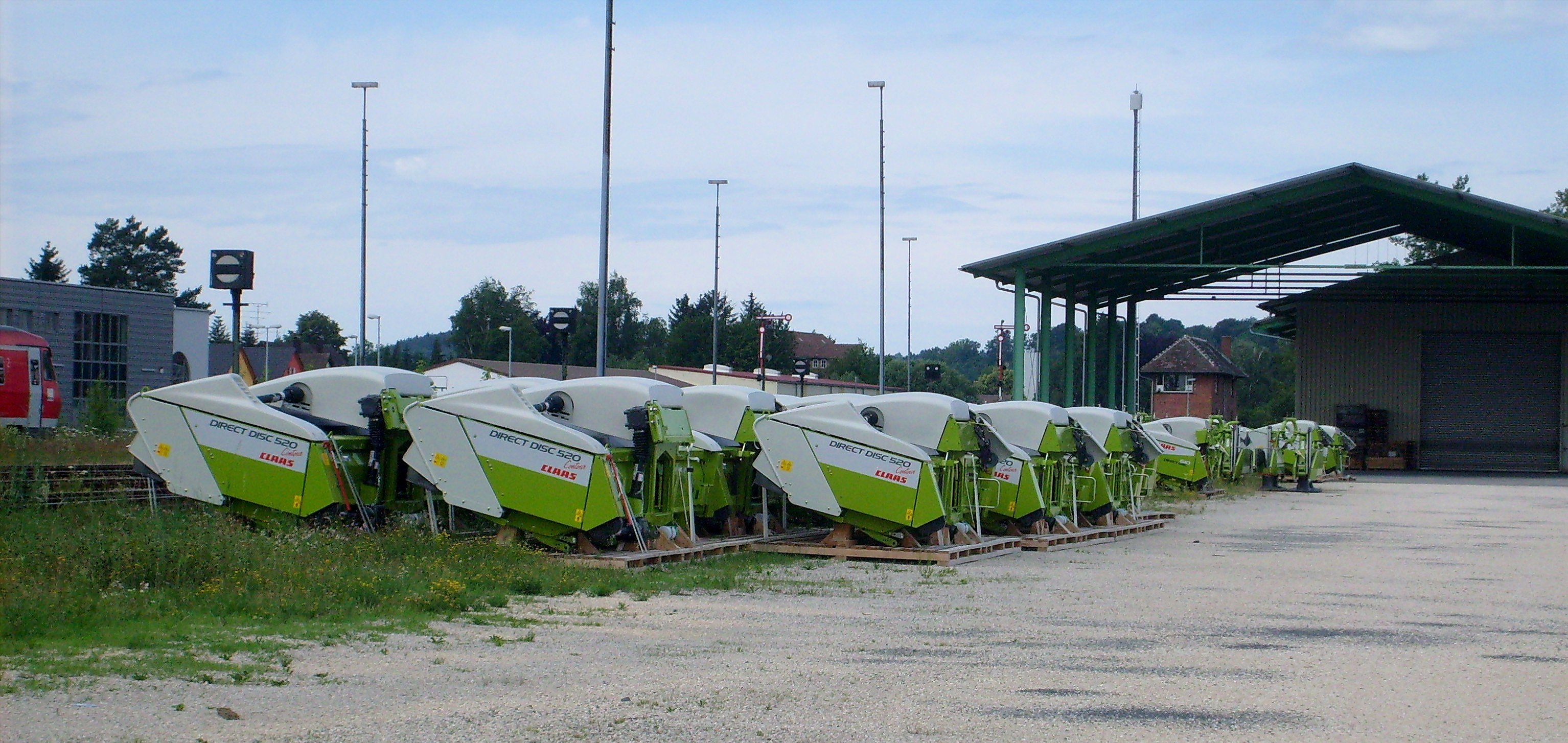 Direktschneidwerk-Häckslervorsätze Direct Disc 520 Contour von Claas (für Claas-Feldshäcksler Jaguar) an der Verladerampe beim Güterbahnhof in Mengen